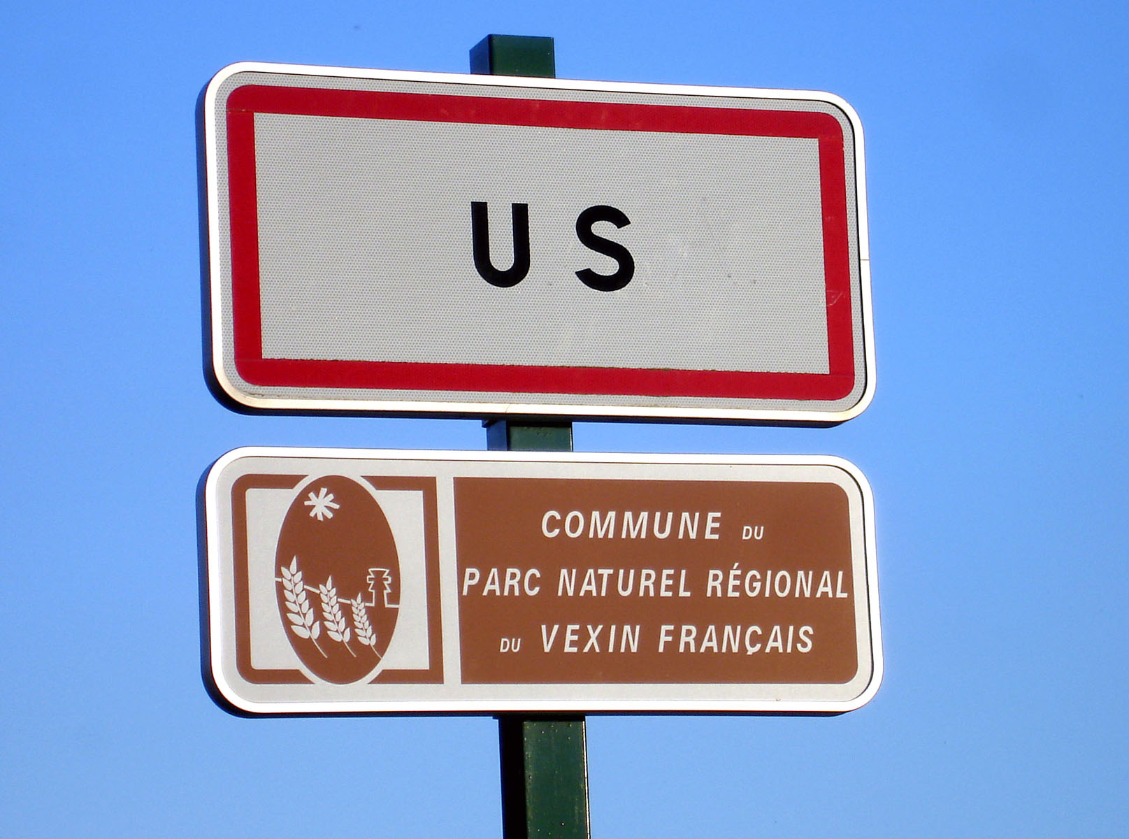 Panneau d'entrée de la commune d'Us, Val-d'Oise, France.